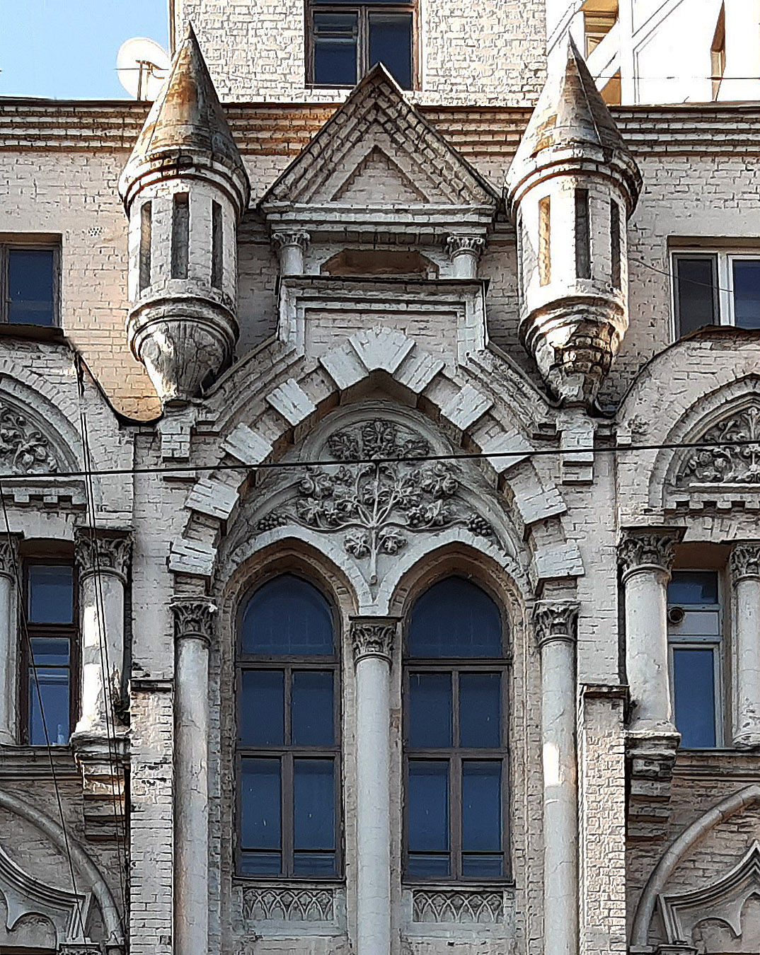 Прибутковий будинок, 1903, бульвар Тараса Шевченка, 31, Київ